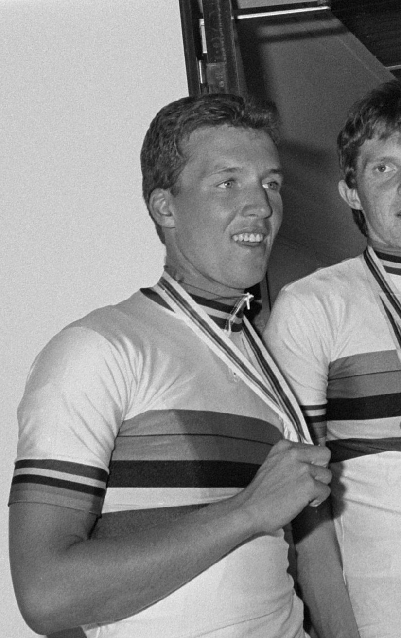 Aankomst Nederlandse Amateurwielerploeg uit Colorado op Schiphol; Tom Cordes